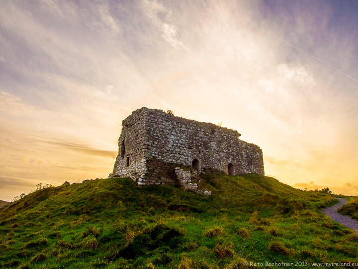 Dieses Bild entstand an einem wunderschönen Herbstabend auf dem Rock of Dunamase, Co. Laois